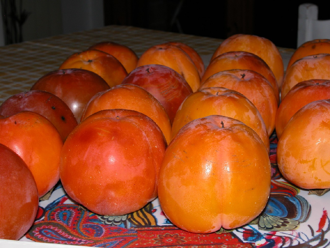 picture of Diospyros kaki